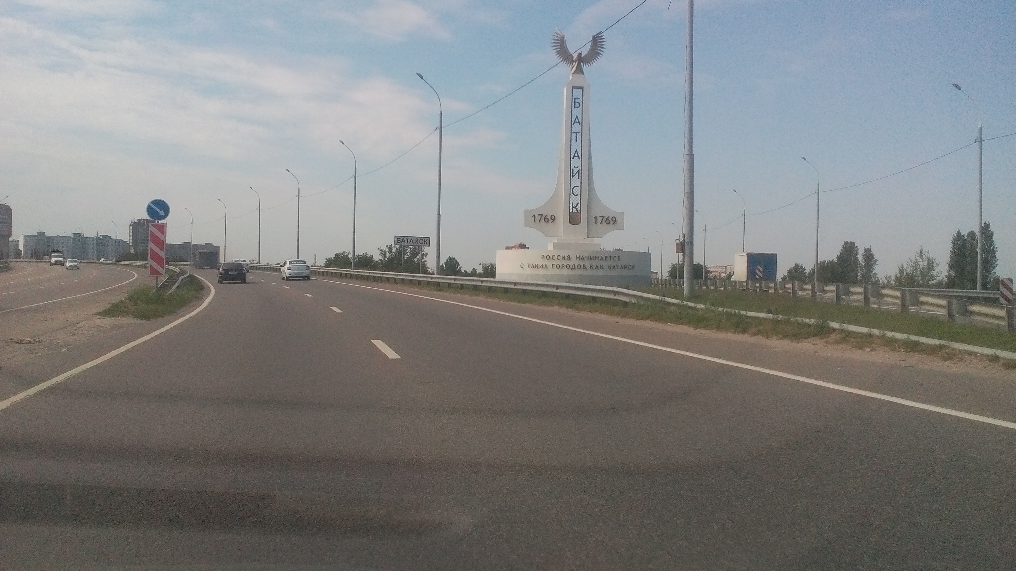 Стела на въезде в Батайск со стороны Ростова-на-Дону.